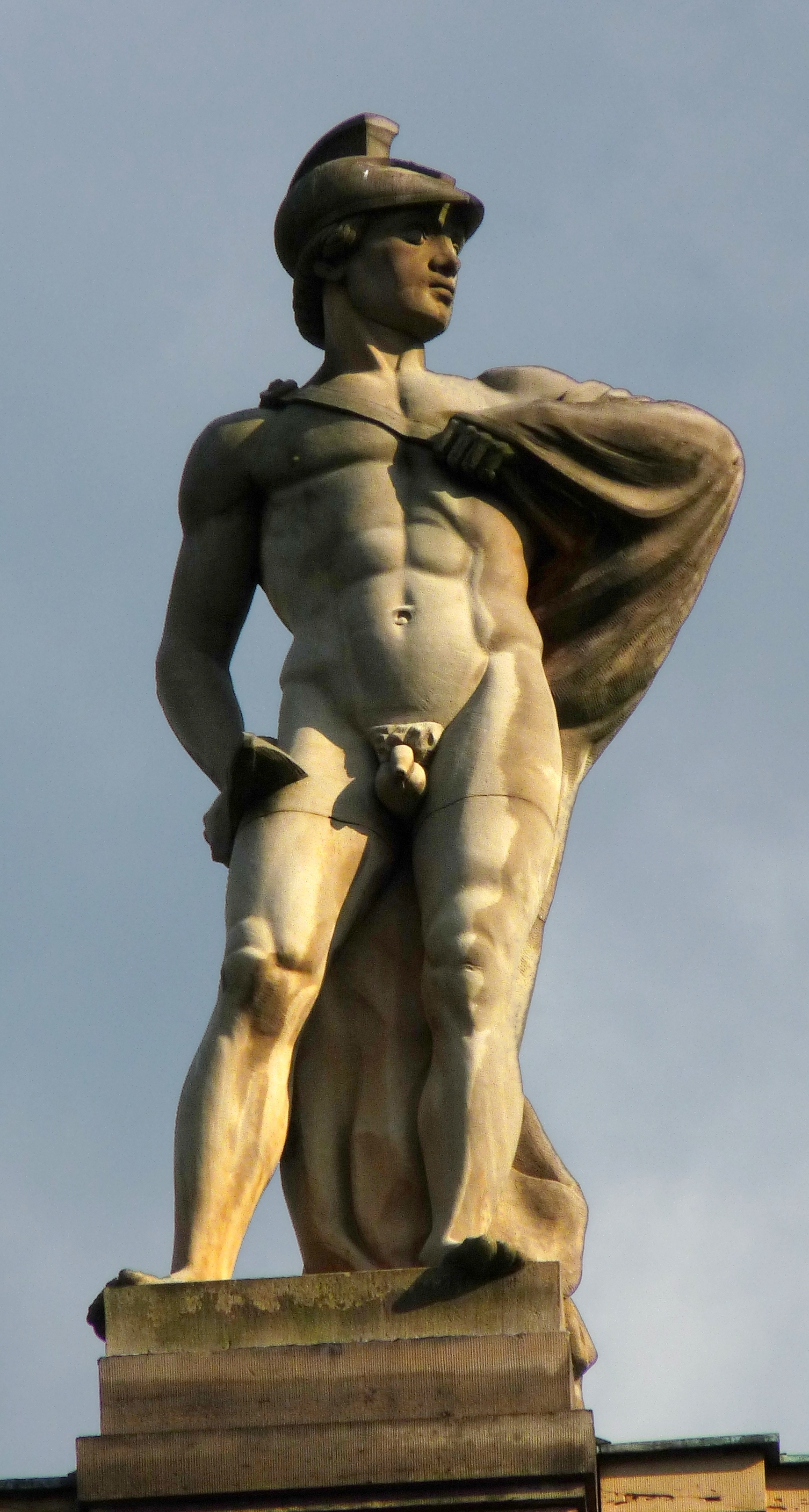 Allegorie der Dramatik von Melchior von Hugo, 4. Attikafigur (von links) auf dem Portikus des Großen Hauses der Staatstheater Stuttgart, 1912.